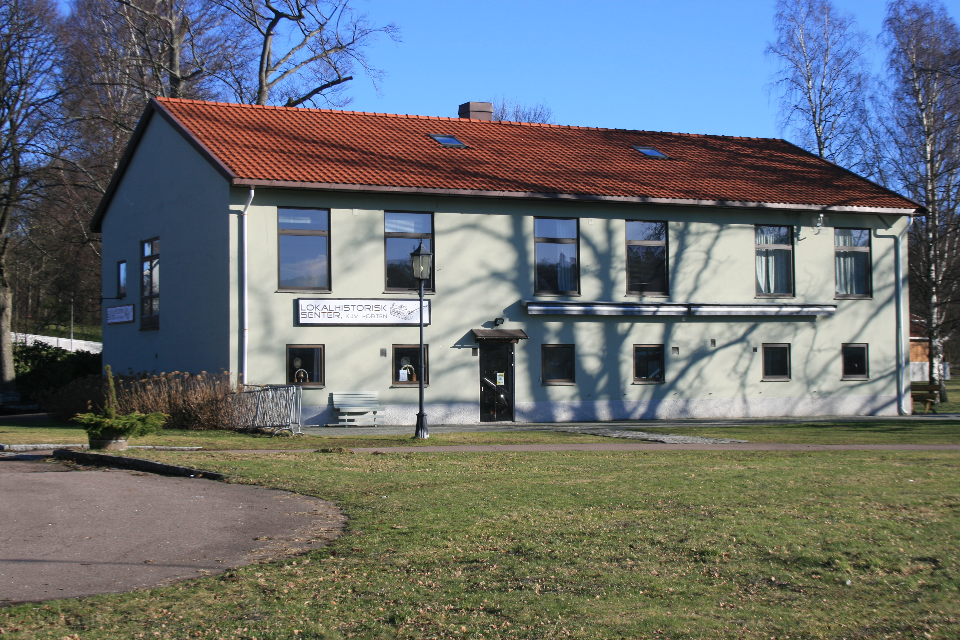 Lokalhistorisk senter på Karljohansvern